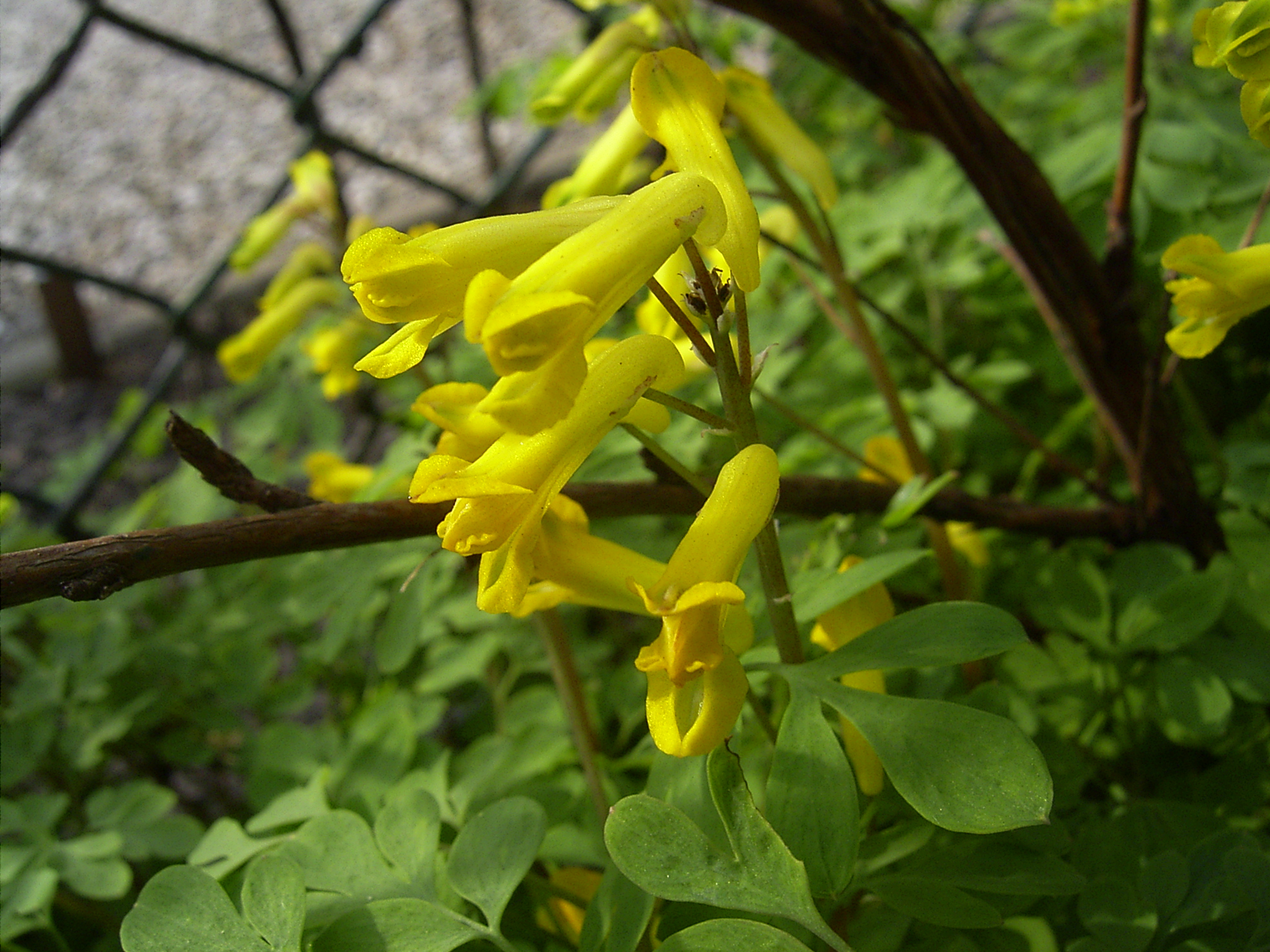 uit de serie onze tuin, 17 april 2004